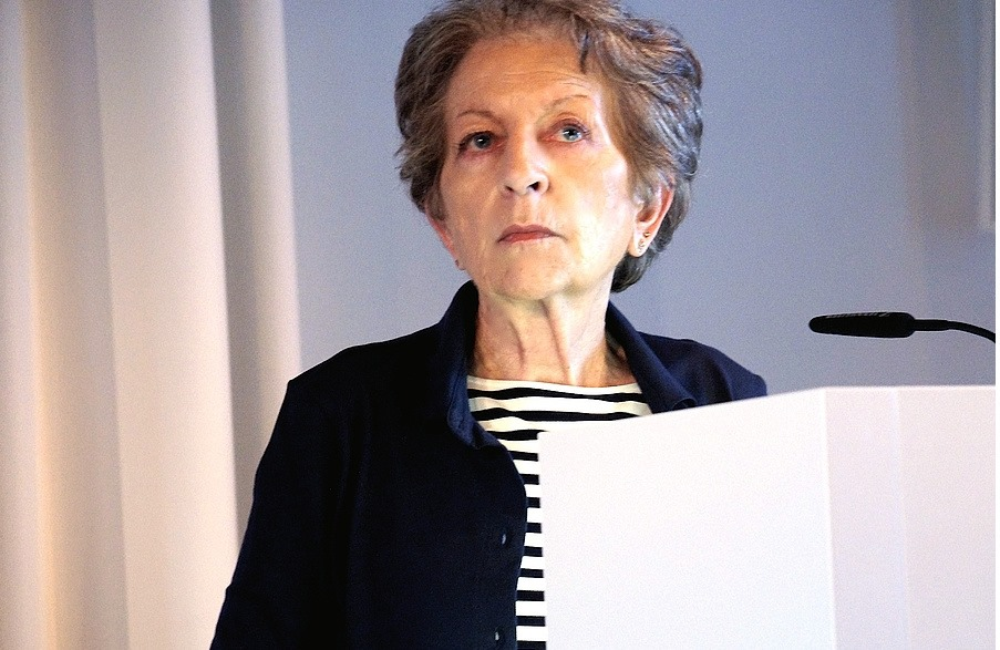 ICI Berlin Institute for Cultural Inquiry,Conference 2015